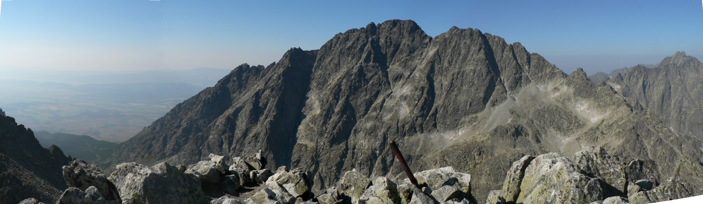 Pohled na Gerlachovský štít z Východné Vysoké.